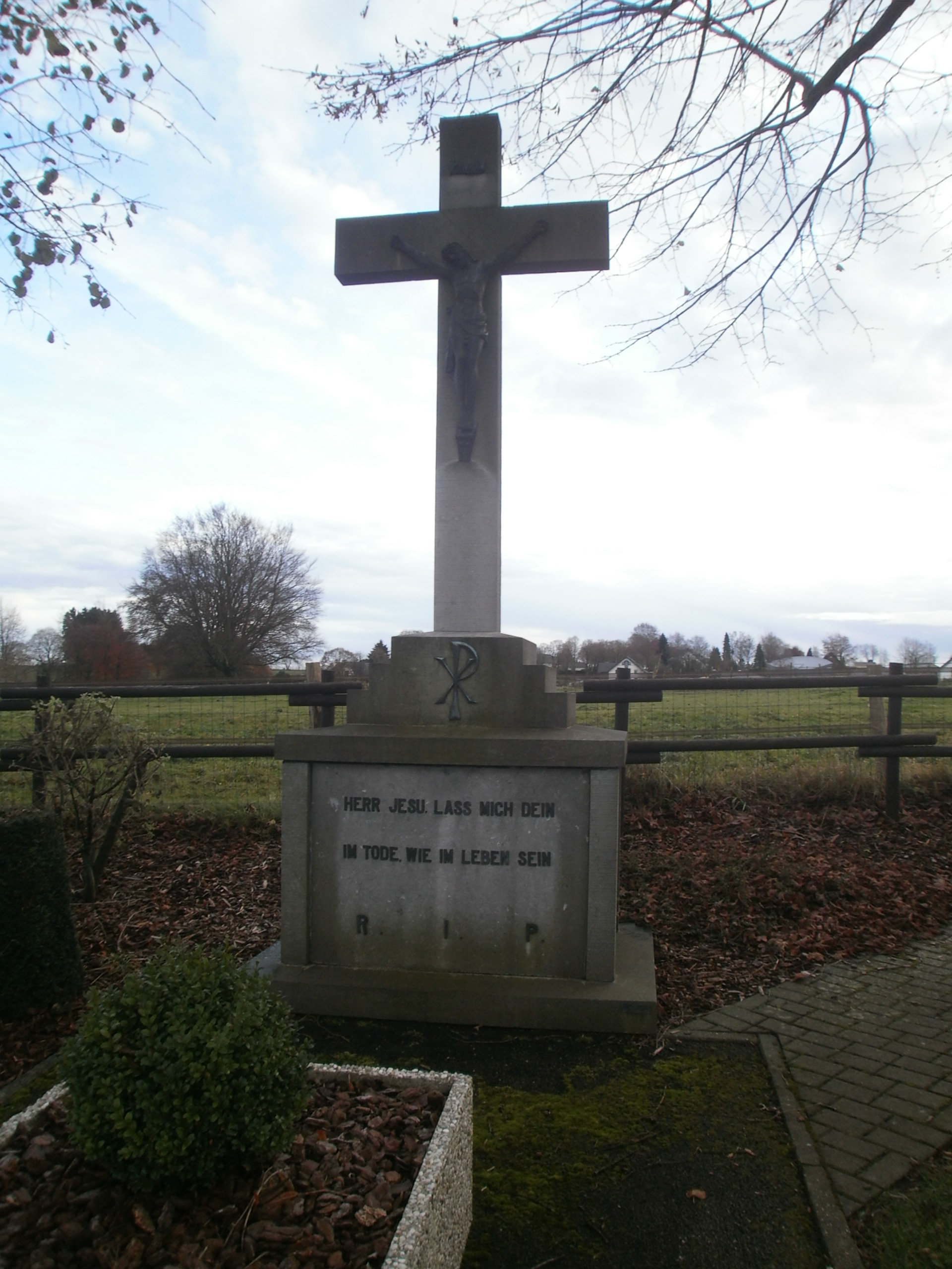 Rist - mälestusmärk Jeesus Kristuse auks Morshecki tänava äärses surnuaias.